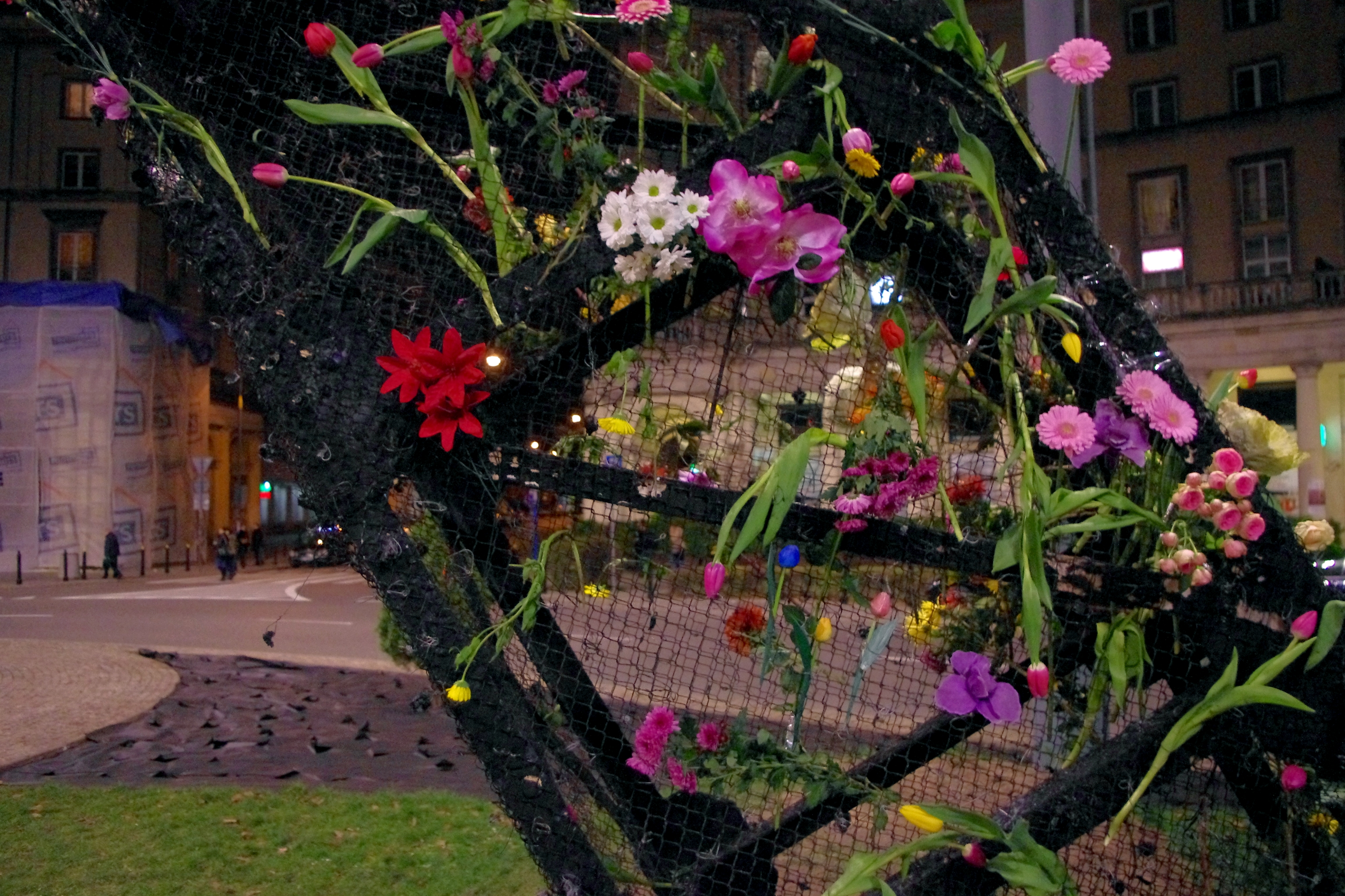 ”Tęcza” ma warszawskim placu Zbawiciela, dzień po spaleniu podczas Marszu Niepodległości 2013